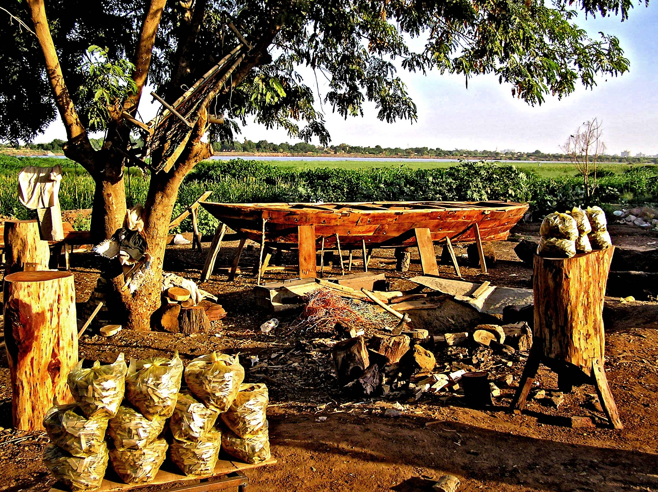 Boat building in Omdurman, Sudan